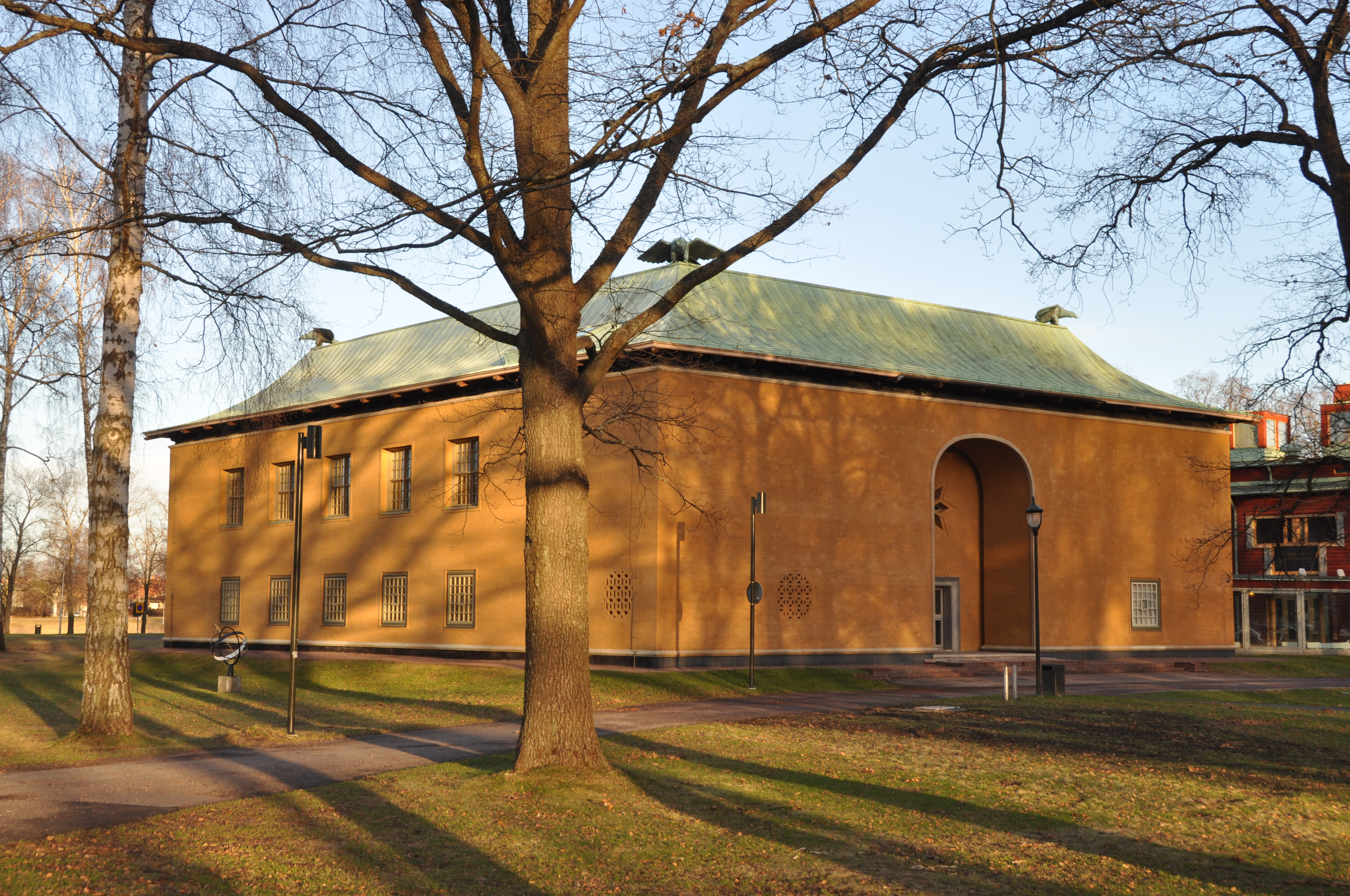 Cyrillushuset, Värmlands Museum. Byggår 1929. Arkitekt Cyrillus Johansson